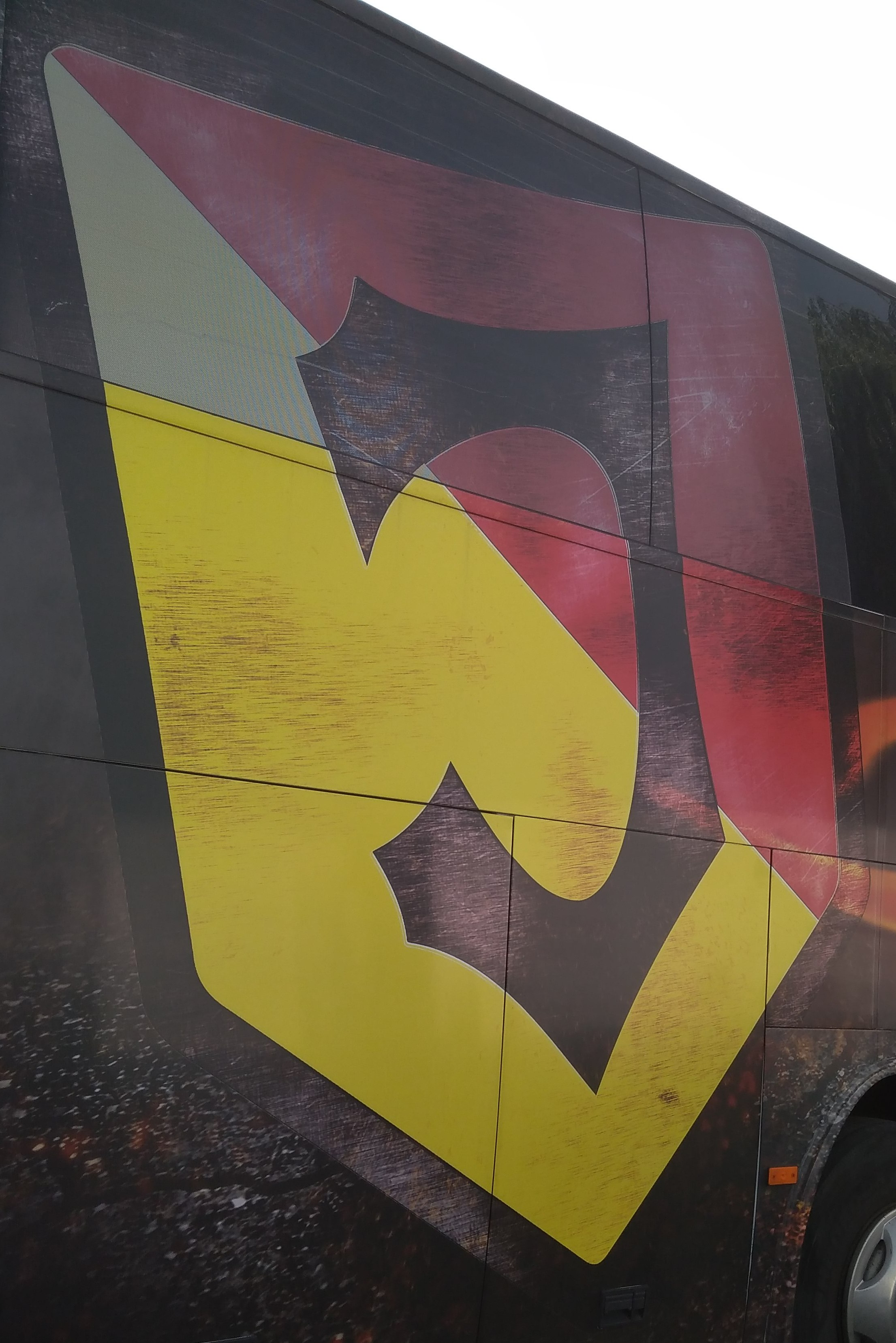 Herb klubu Jagiellonia Białystok na klubowym autokarze